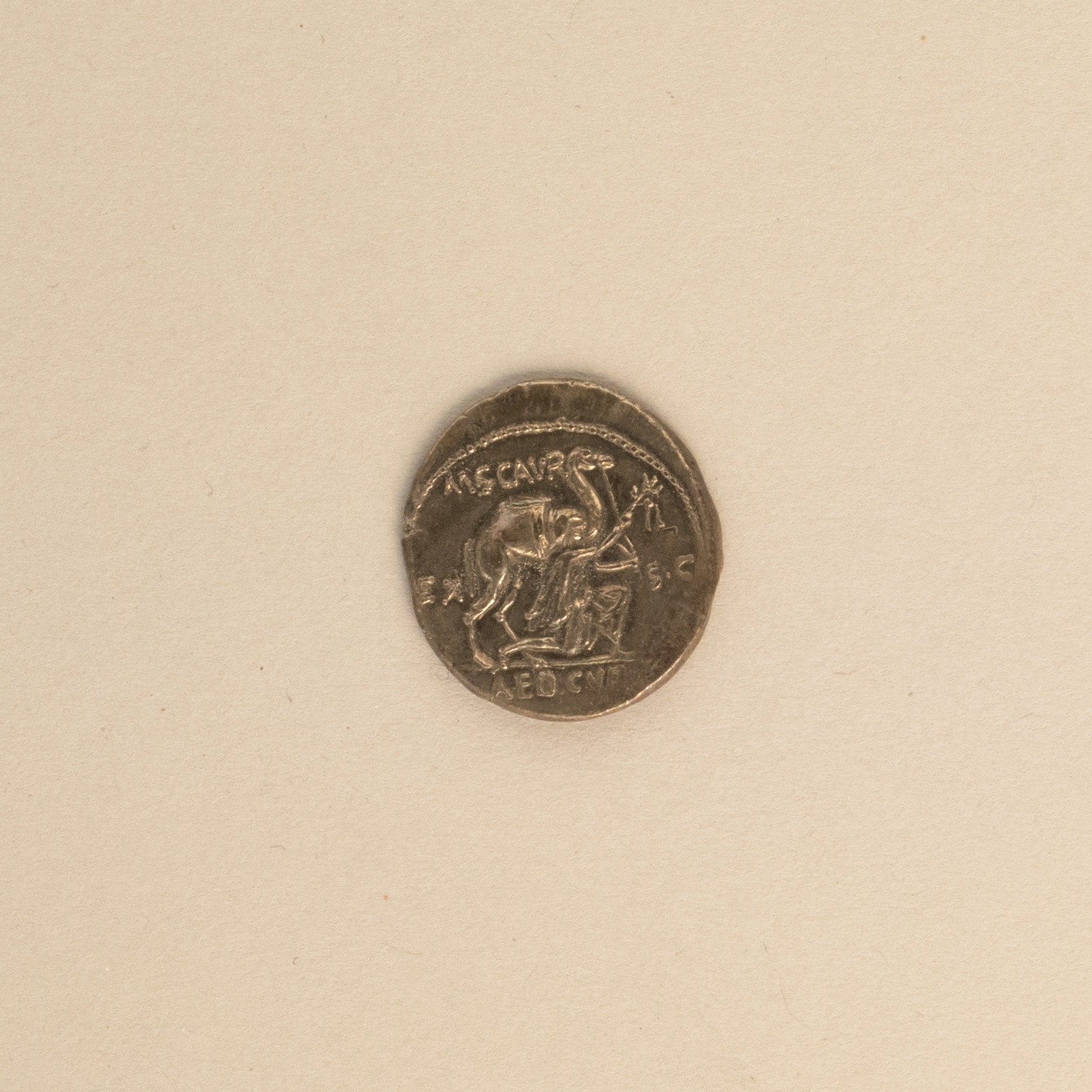 Roman; Denarius; Coins